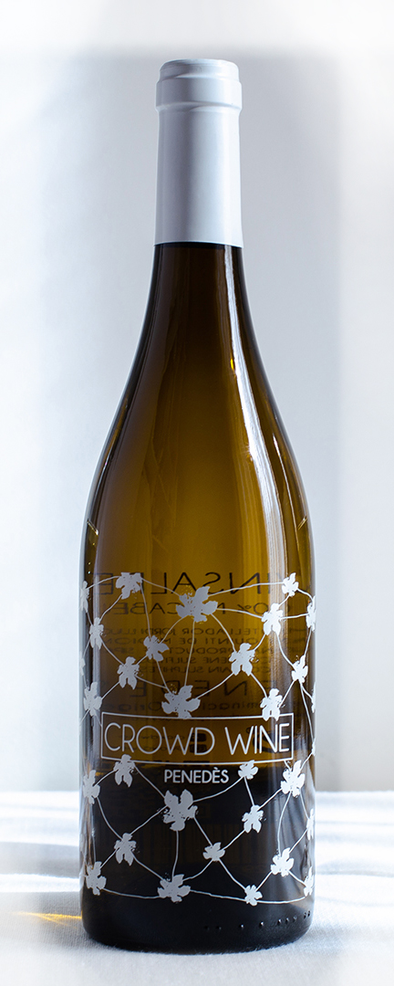 Vino blanco artesanal monovarietal Macabeu de la región del Penedès